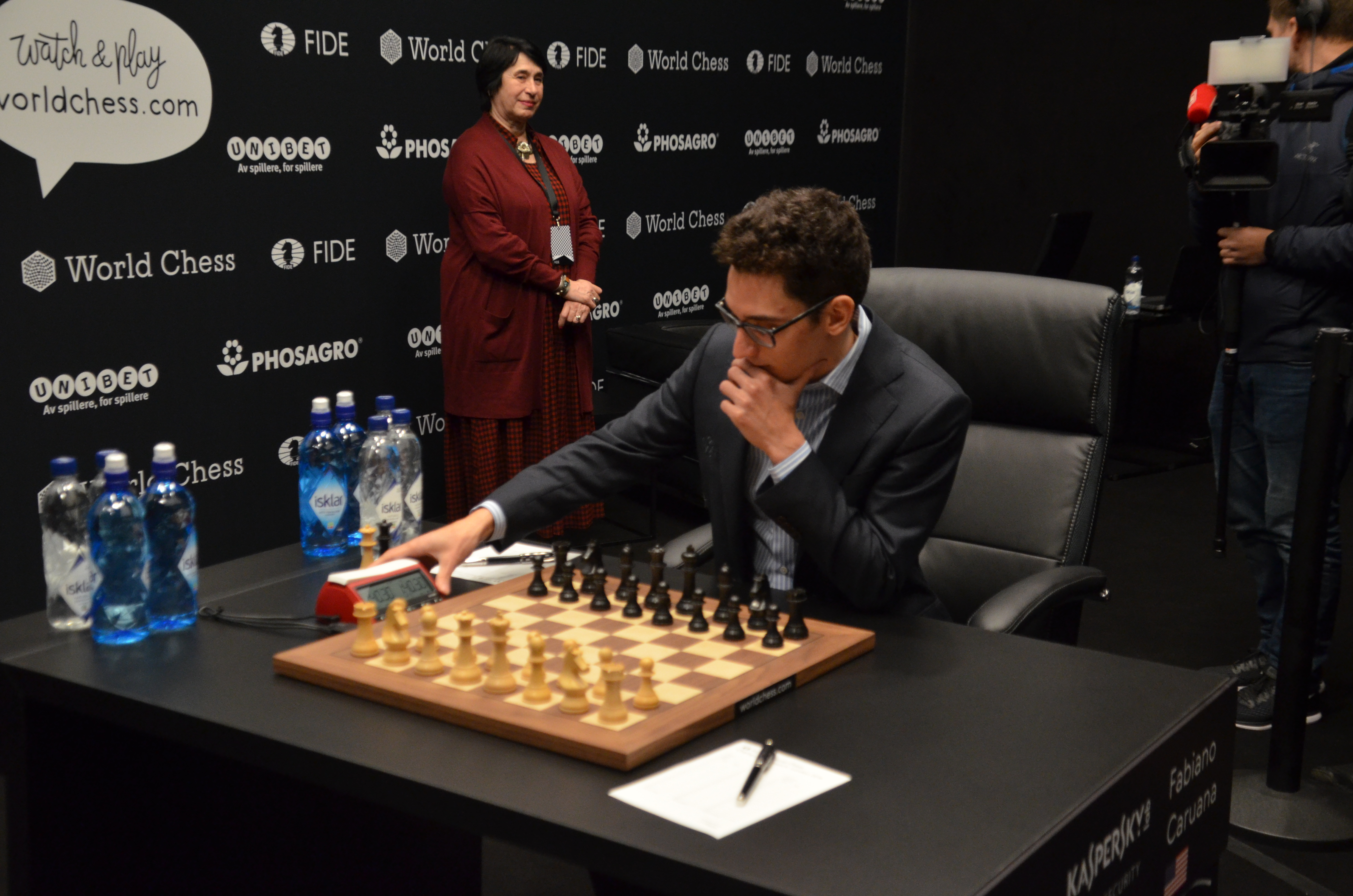 El italo-americano Fabiano Caruana, preparado, esperando la llegada del Campeón del Mundo Magnus Carlsen, momentos antes del inicio de la novena partida del match, Londres 2018.